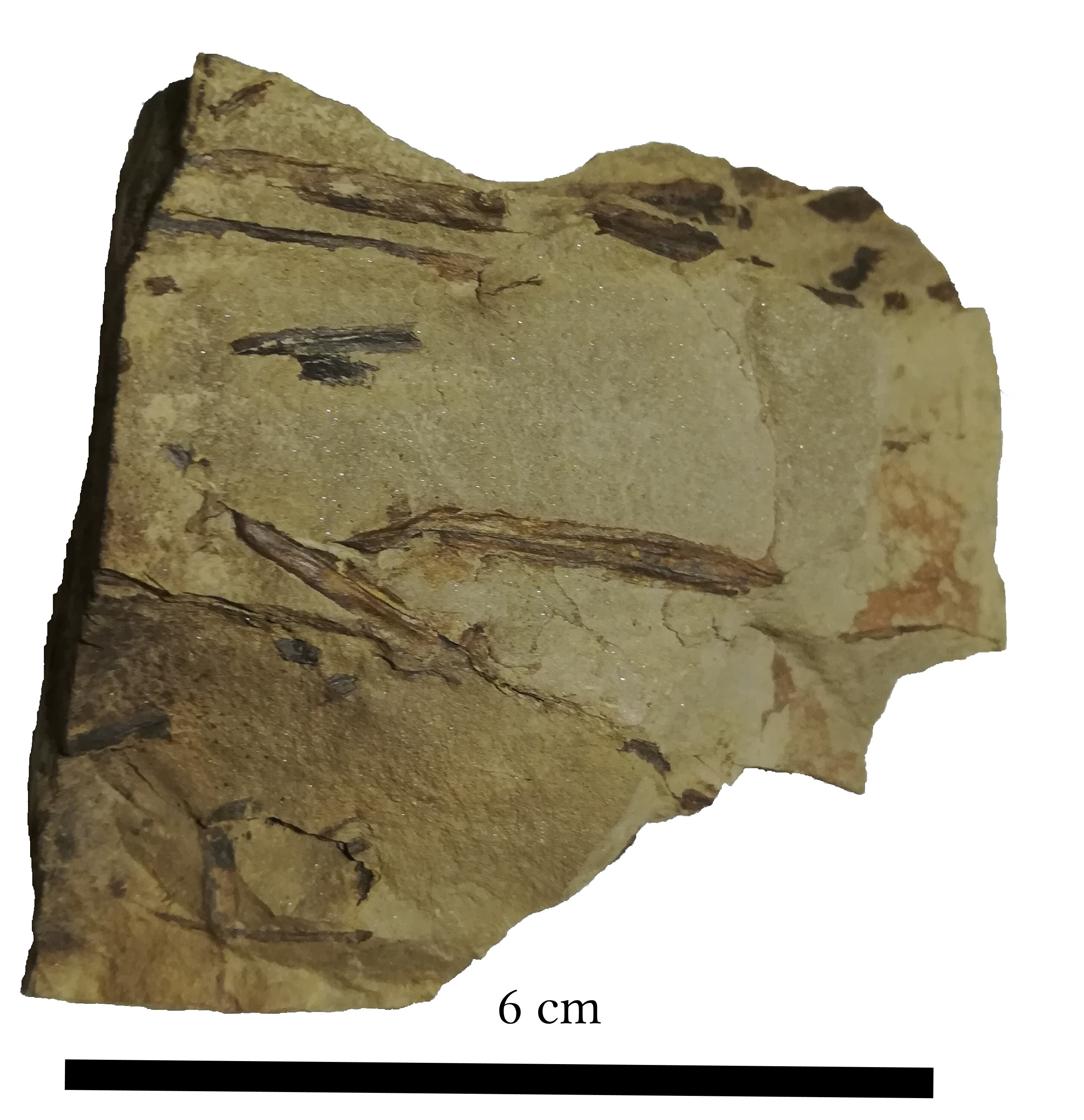 Stockmansella langii aus den Siegen-Schichten des Wahnbachtals.